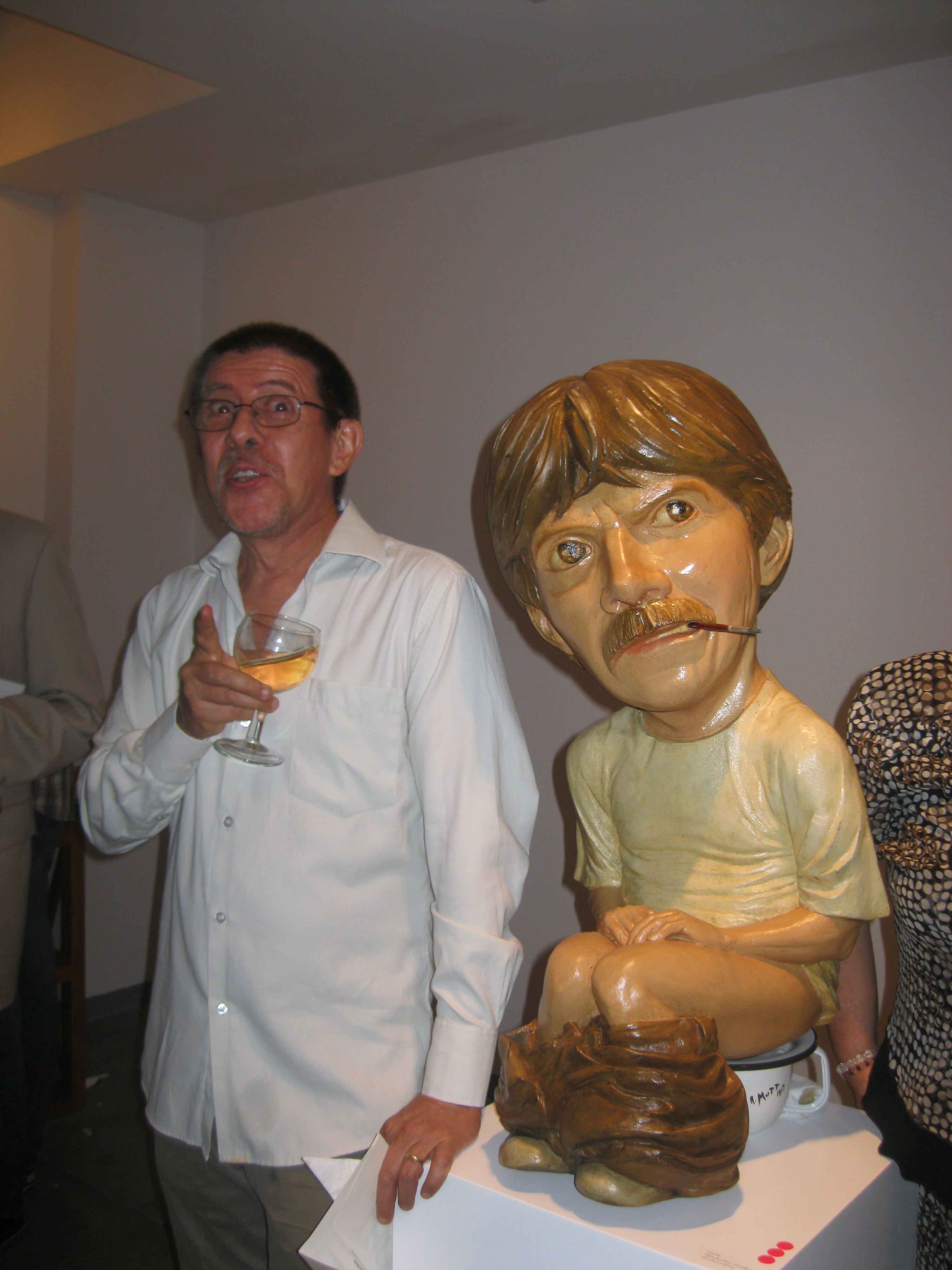 Jorge Velarde junto a su obra "Fuente", parte de una serie de esculturas del artista.